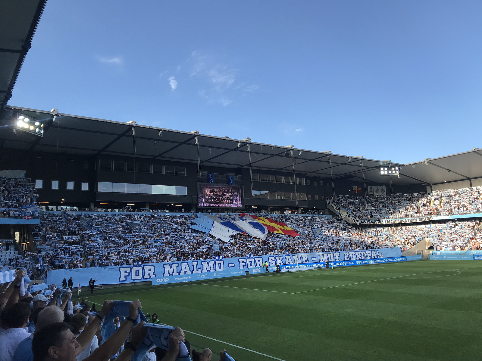 MFF:s klackens tifo inför matchen mot Vidi FC på Stadion i Malmö i kvalomgång 3 till Uefa Champions League 2018/19